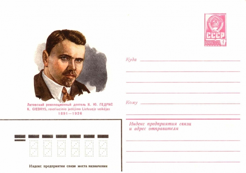 Художественные маркированные конверты 1981 года.